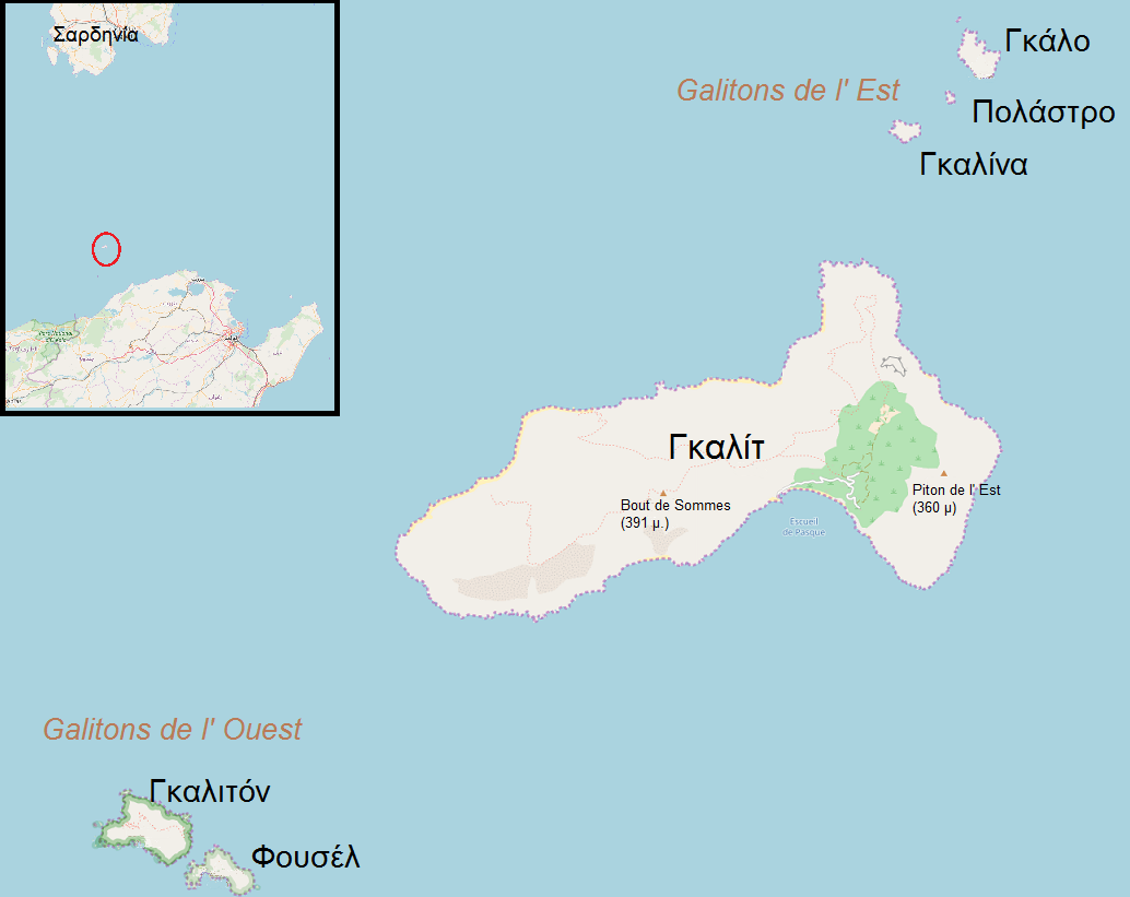 Νησιά Γκαλίτ